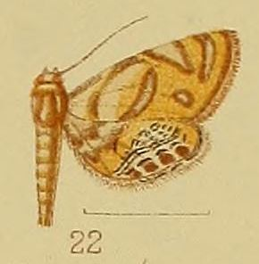 Eoophyla capensis